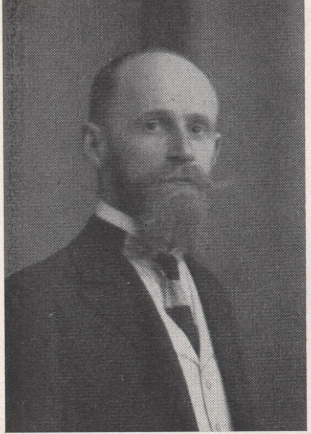 Friedrich Ritter von Lama, Schriftsteller, NS-Opfer, ermordet